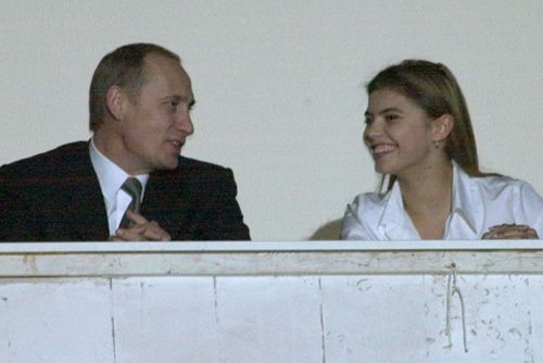 МОСКВА, СПОРТКОМЛЕКС ЦСКА. С чемпионкой Европы и мира Алиной Кабаевой во время шоу после соревнований на Кубок России и чемпионата России по художественной гимнастике.